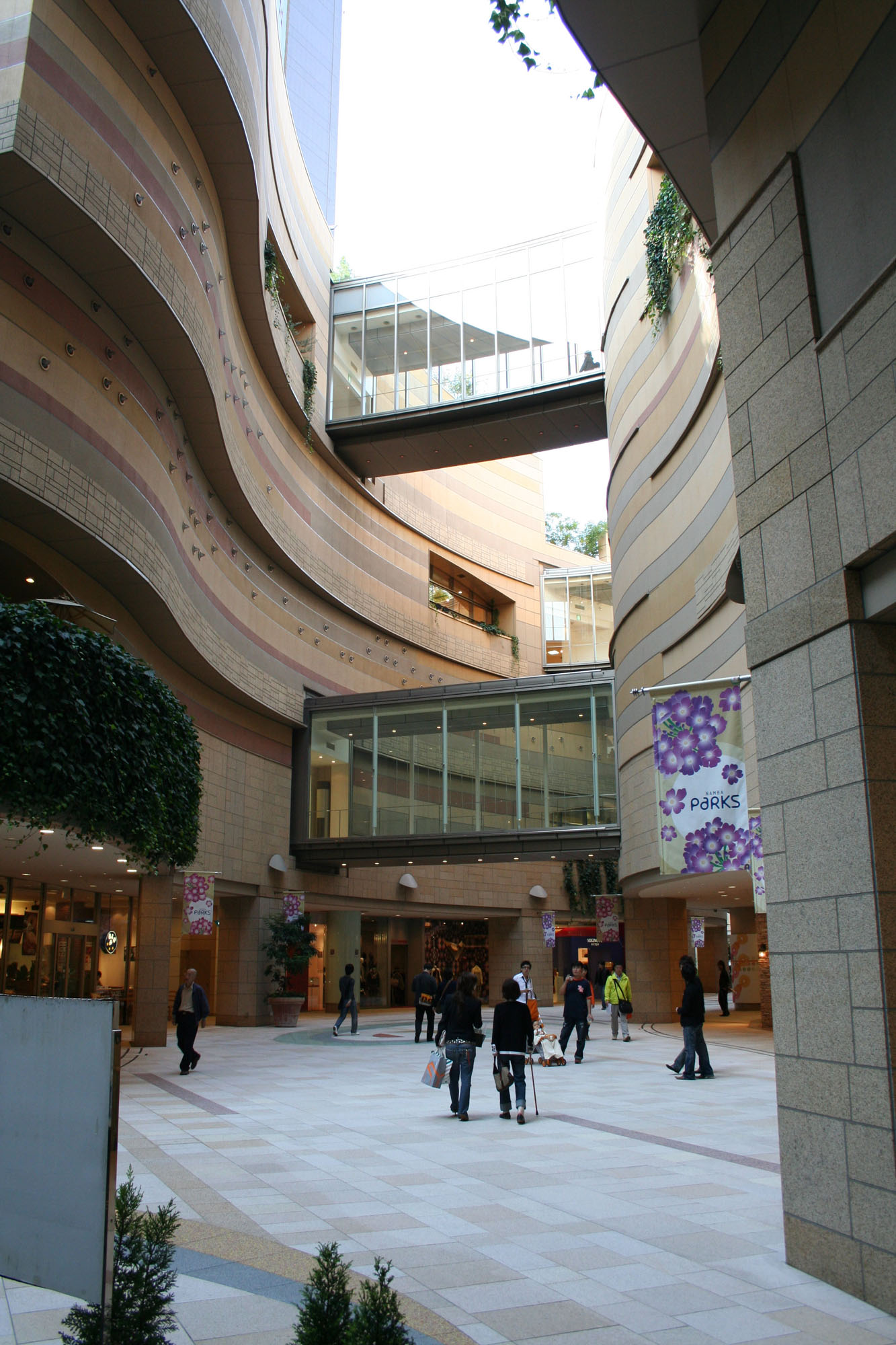 Namba Parks(なんばパークス) in Osaka, Japan